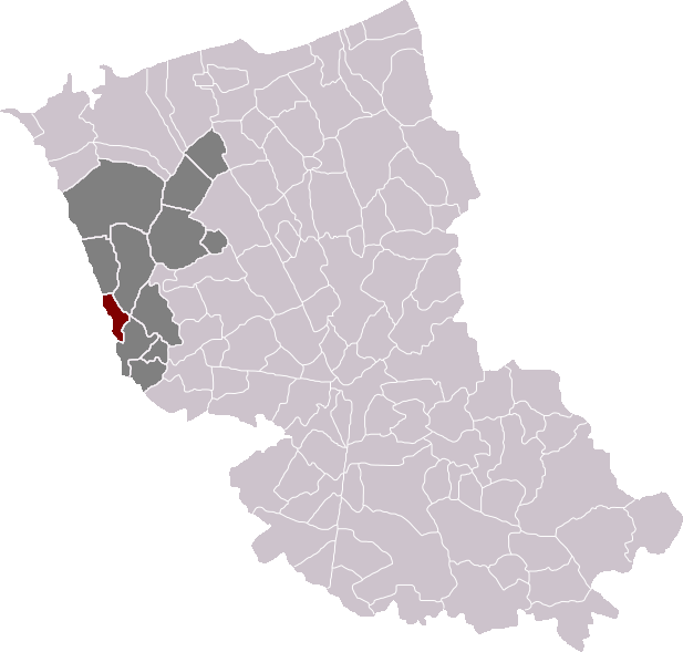 Locatie gemeente Holke in arrondissement Duinkerke. Zelfgemaakt. Location of Holque municipality in the arrondissement of Dunkirk. Self made. Localisation de la commune de Holque dans l'arrondissement de Dunkerque. Fait moi-même.